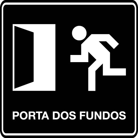 Pôster da websérie Porta dos Fundos.